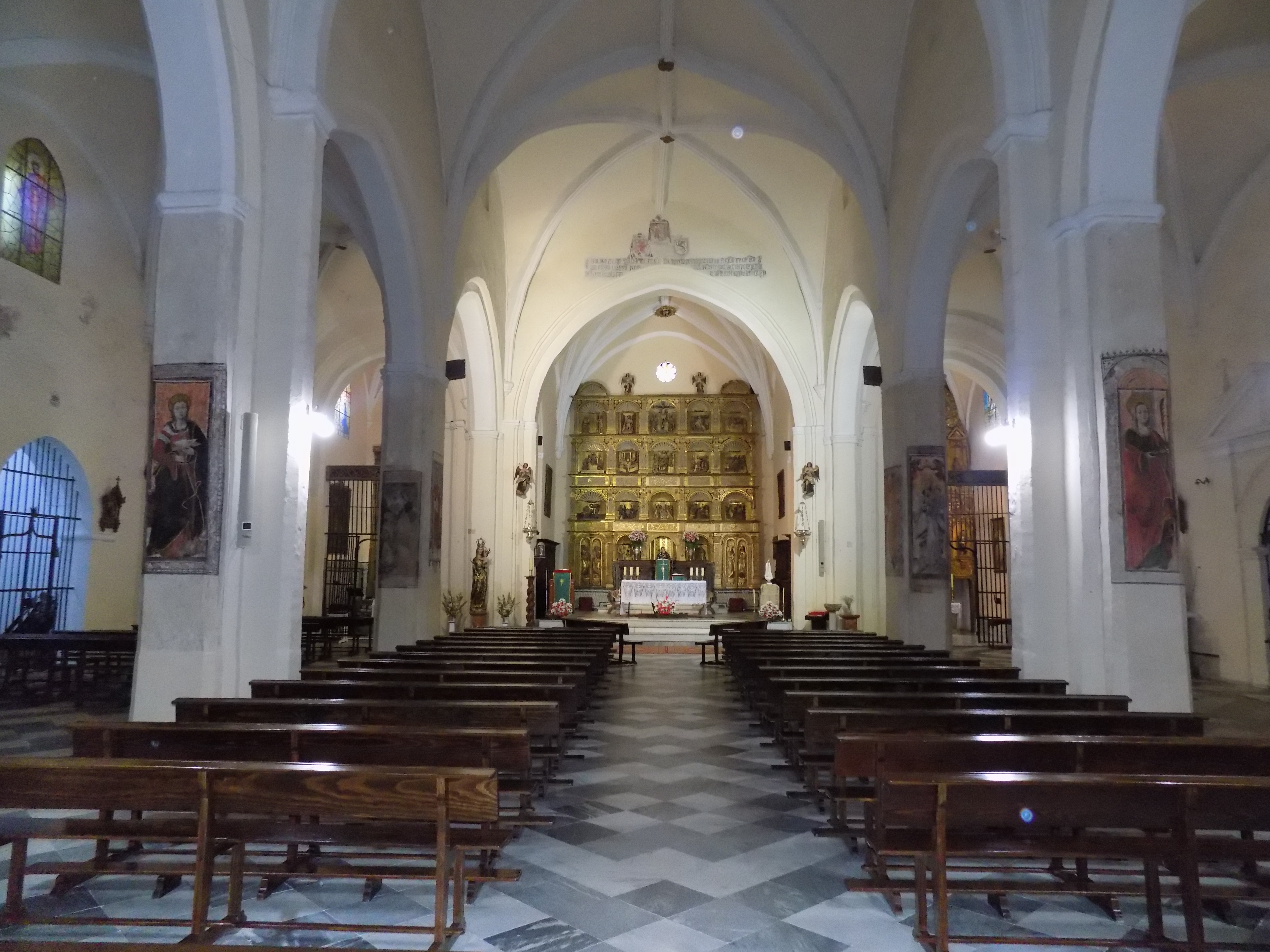 Vista general de la nave y el retablo mayor de la iglesia de Nuestra Señora del Castillo de Fuente Obejuna, provincia de Córdoba, (España).